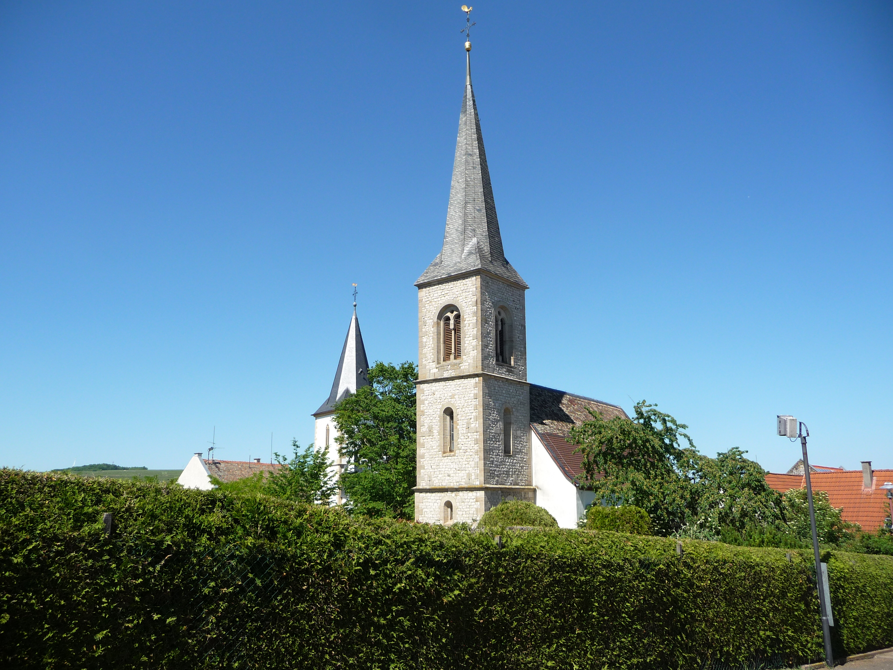 Gundersheim ist eine Ortsgemeinde im Landkreis Alzey-Worms in Rheinland-Pfalz.